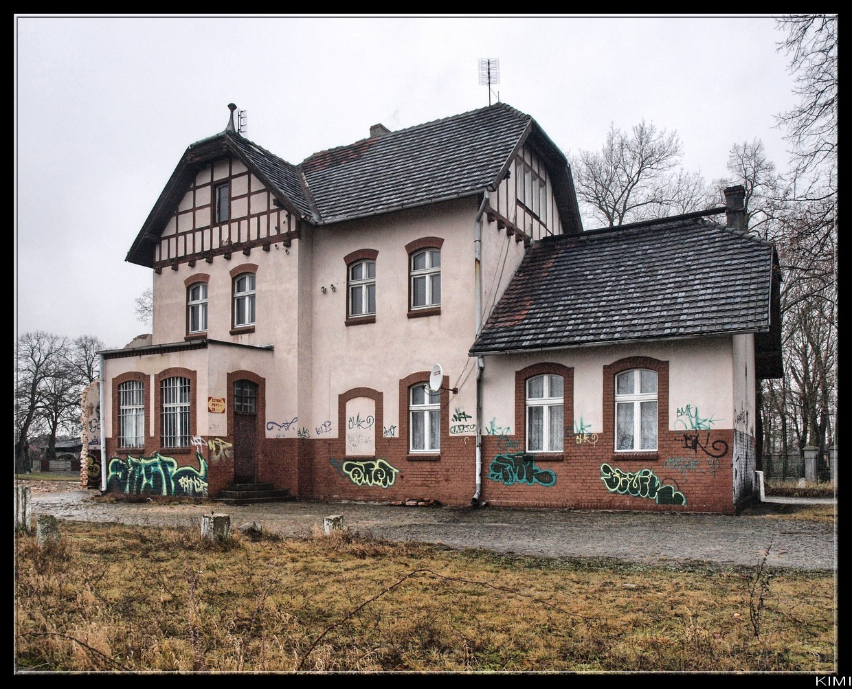 kolej, Otyń